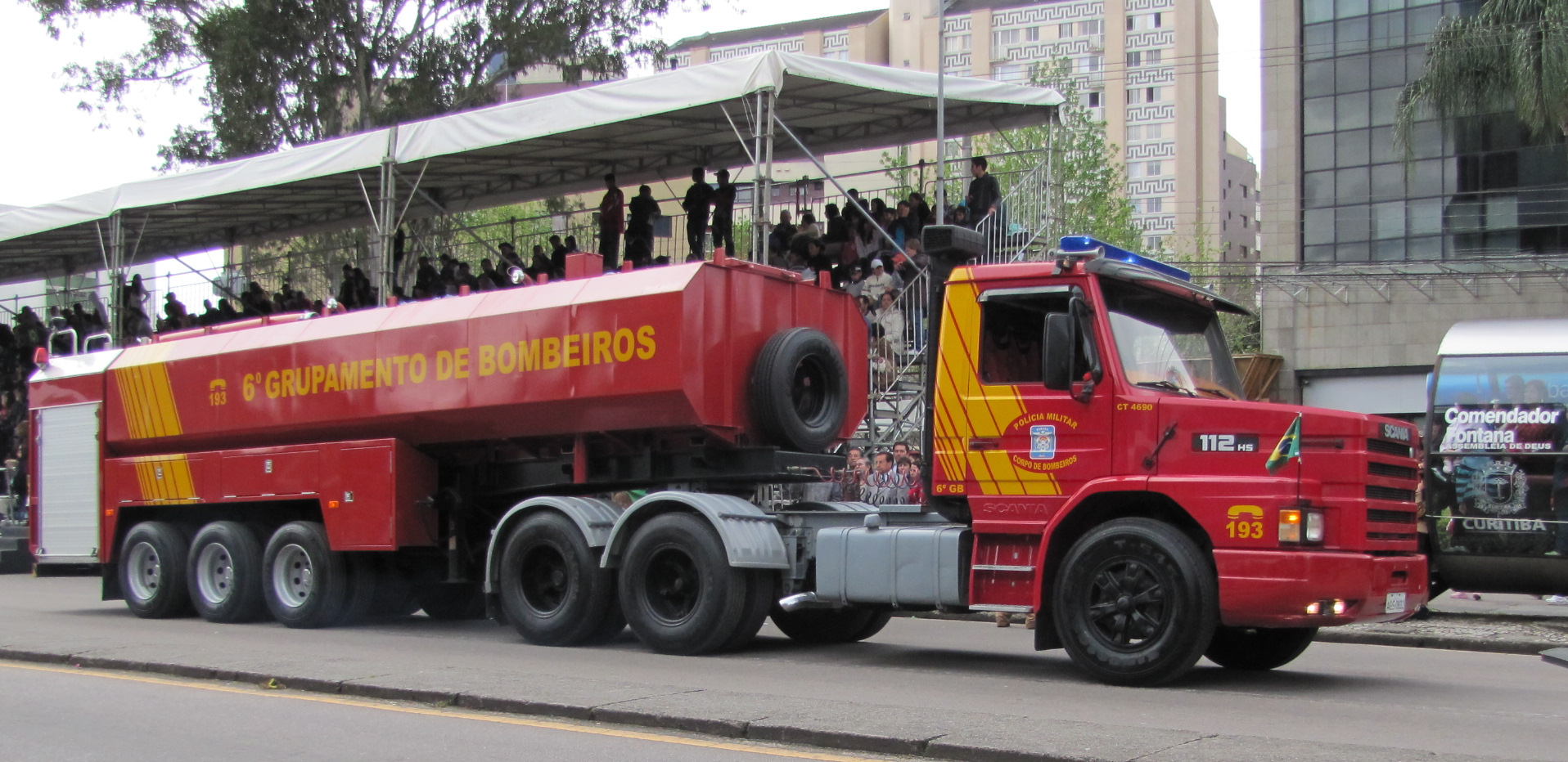 Carro Tanque do Corpo de Bombeiros do Paraná. Scania 112 HS.